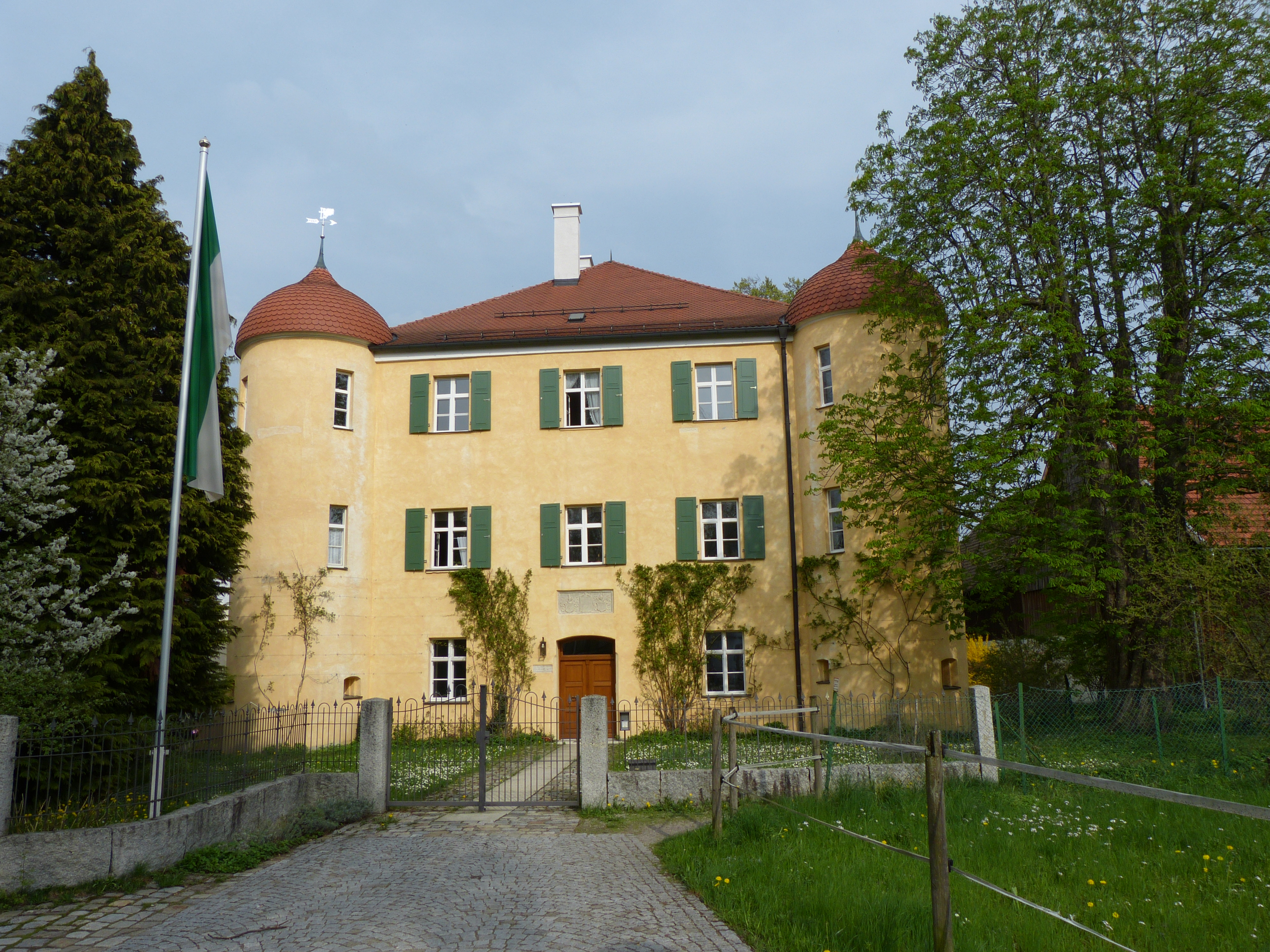 Unteres Schloss, Bad Grönenbach, Landkreis Unterallgäu, Bayern